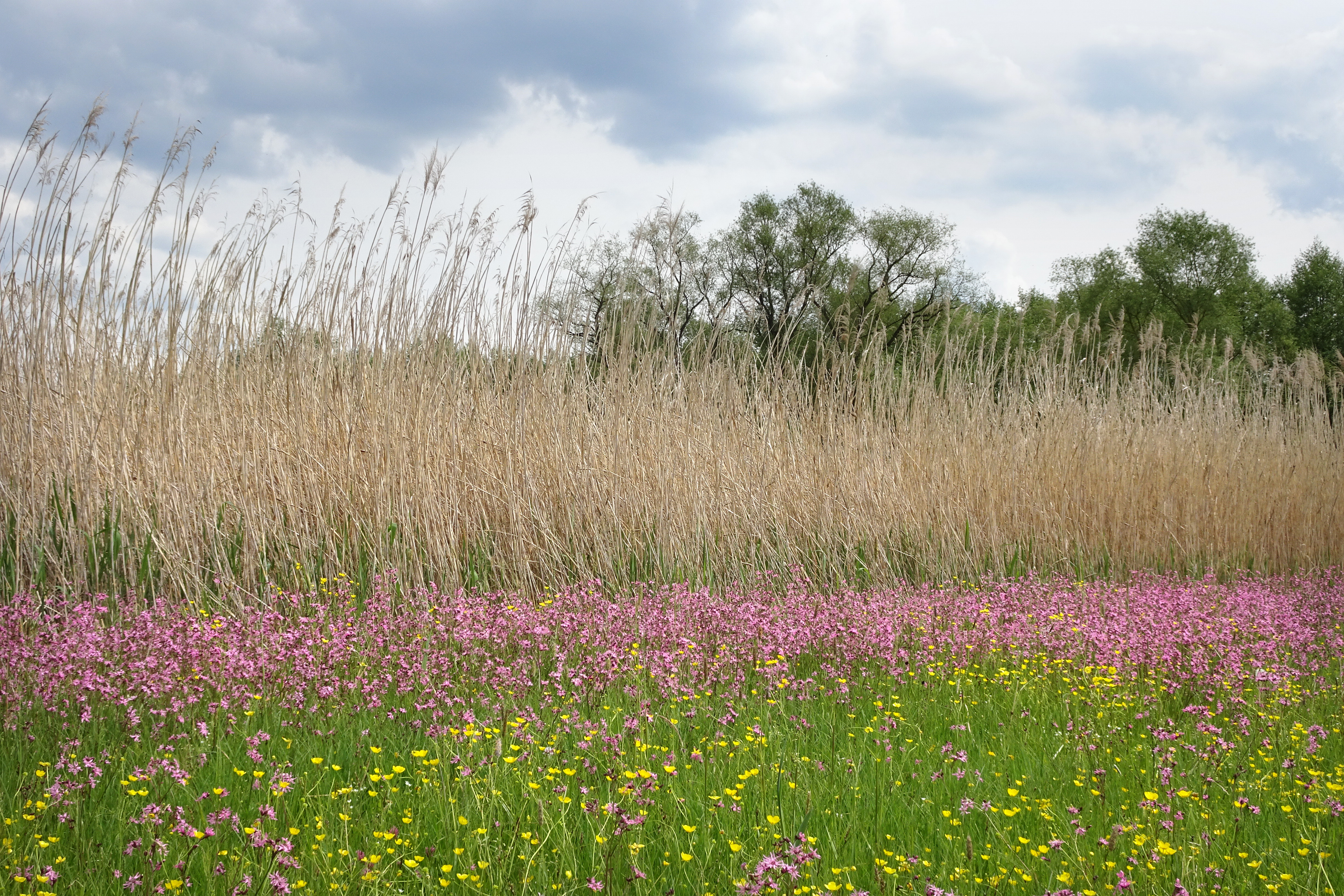 Das Feuchtwiesengebiet besteht aus Flächen in der Gemarkung Weiterode, einem Ortsteil der Stadt Bebra im Landkreis Hersfeld-Rotenburg. Mit Verordnung über das Naturschutzgebiet „Ulfewiesen bei Weiterode“ vom 13. Dezember 1995 des Regierungspräsidiums in Kassel, die am Tage nach der Verkündung im Staatsanzeiger für das Land Hessen vom 1. Januar 1996 in Kraft getreten ist, wurde der Bereich zum Naturschutzgebiet erklärt. Es hat eine Größe von 33,73 Hektar. Zweck der Unterschutzstellung war es, den Bachlauf der Ulfe mit den Zuflüssen und die angrenzenden Auenbereiche zu erhalten, zu sichern und zu entwickeln